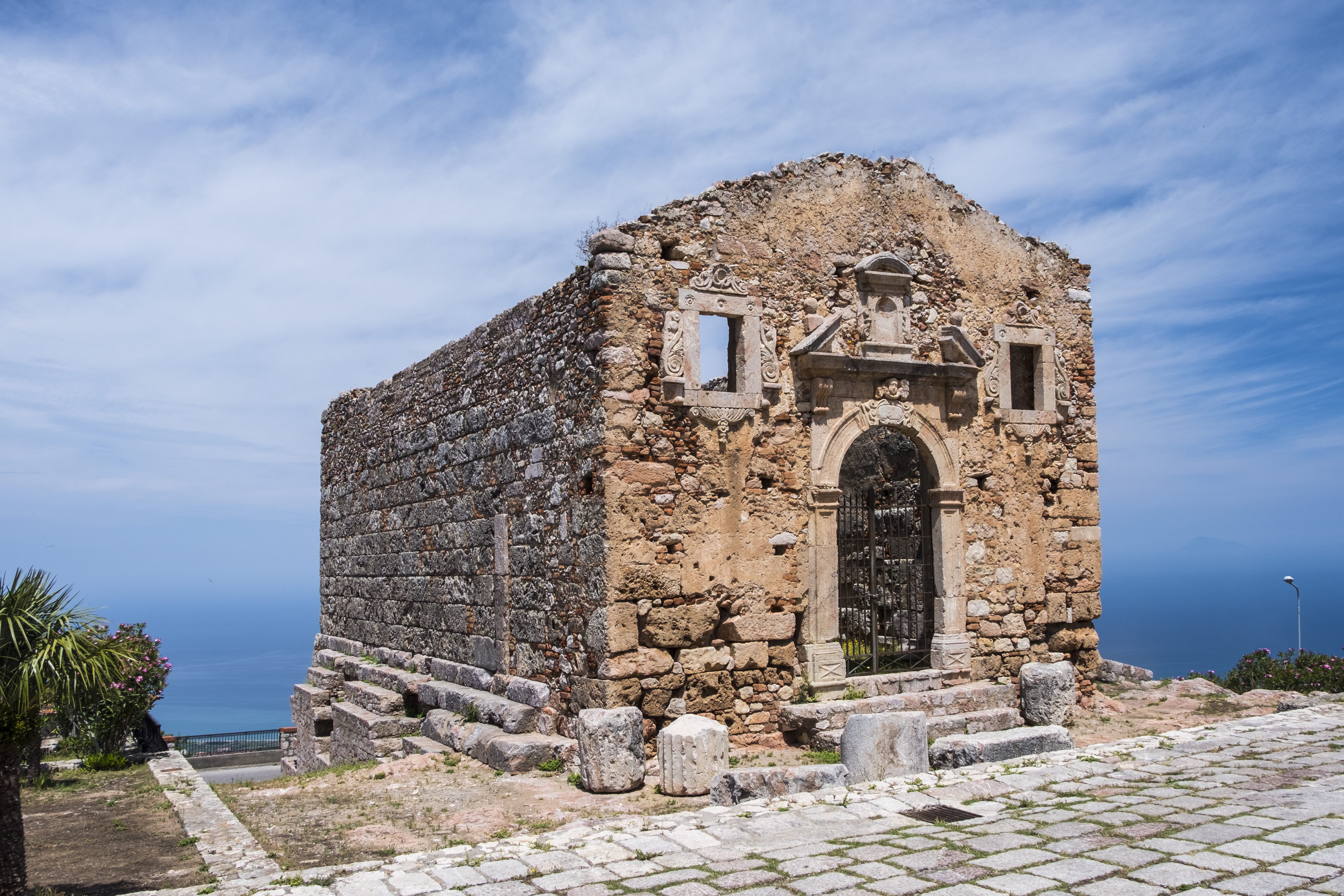 Tempio di Ercole